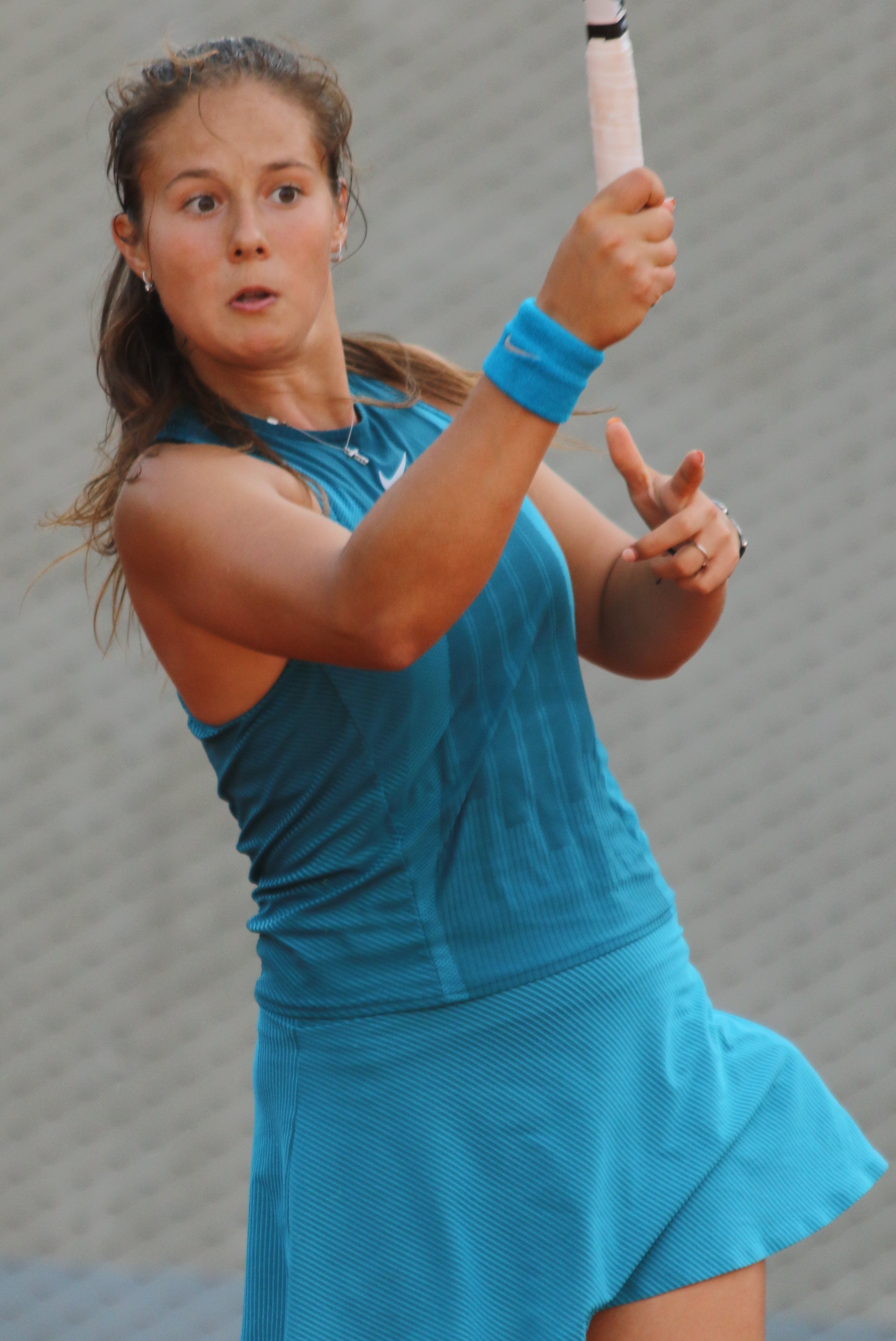 Kasatkina RG18 (13)